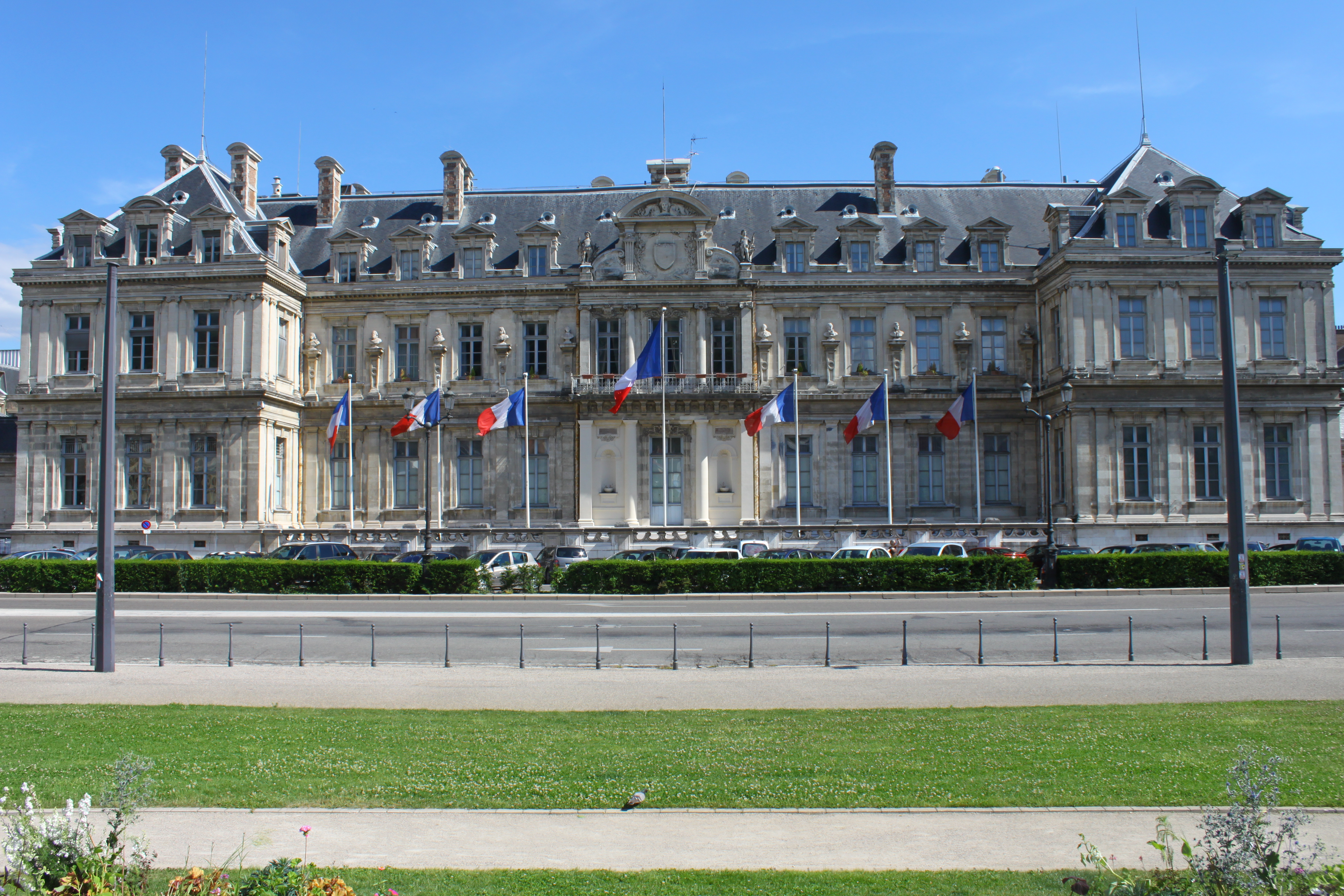 Préfecture de l'Isère - Place Verdun à Grenoble